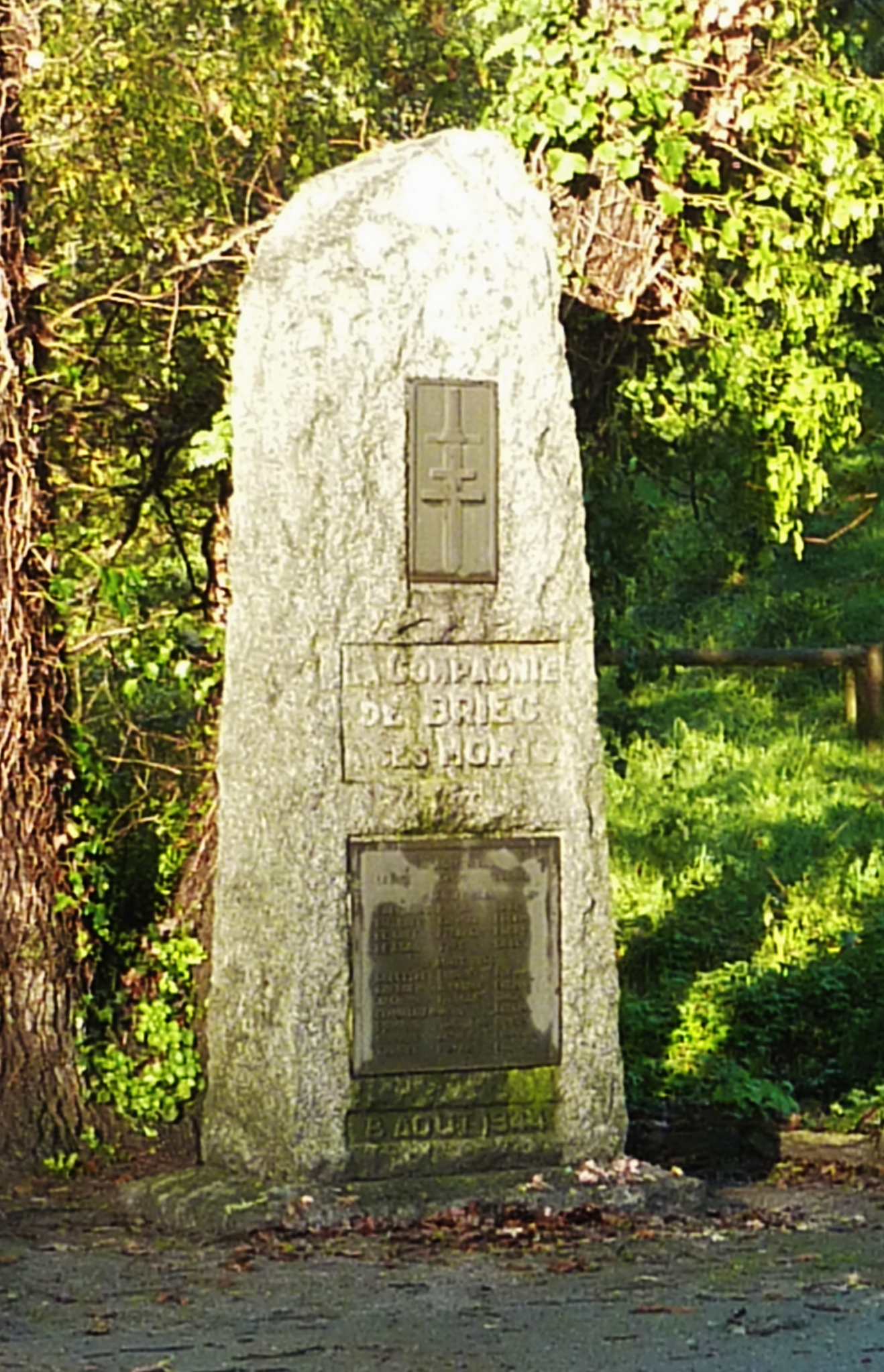 Monument commémoratif des combats de la "Compagnie de Briec" lors de la libération de Quimper le 8 août 1944 (situé à l'entrée de Quimper, route de Brest)